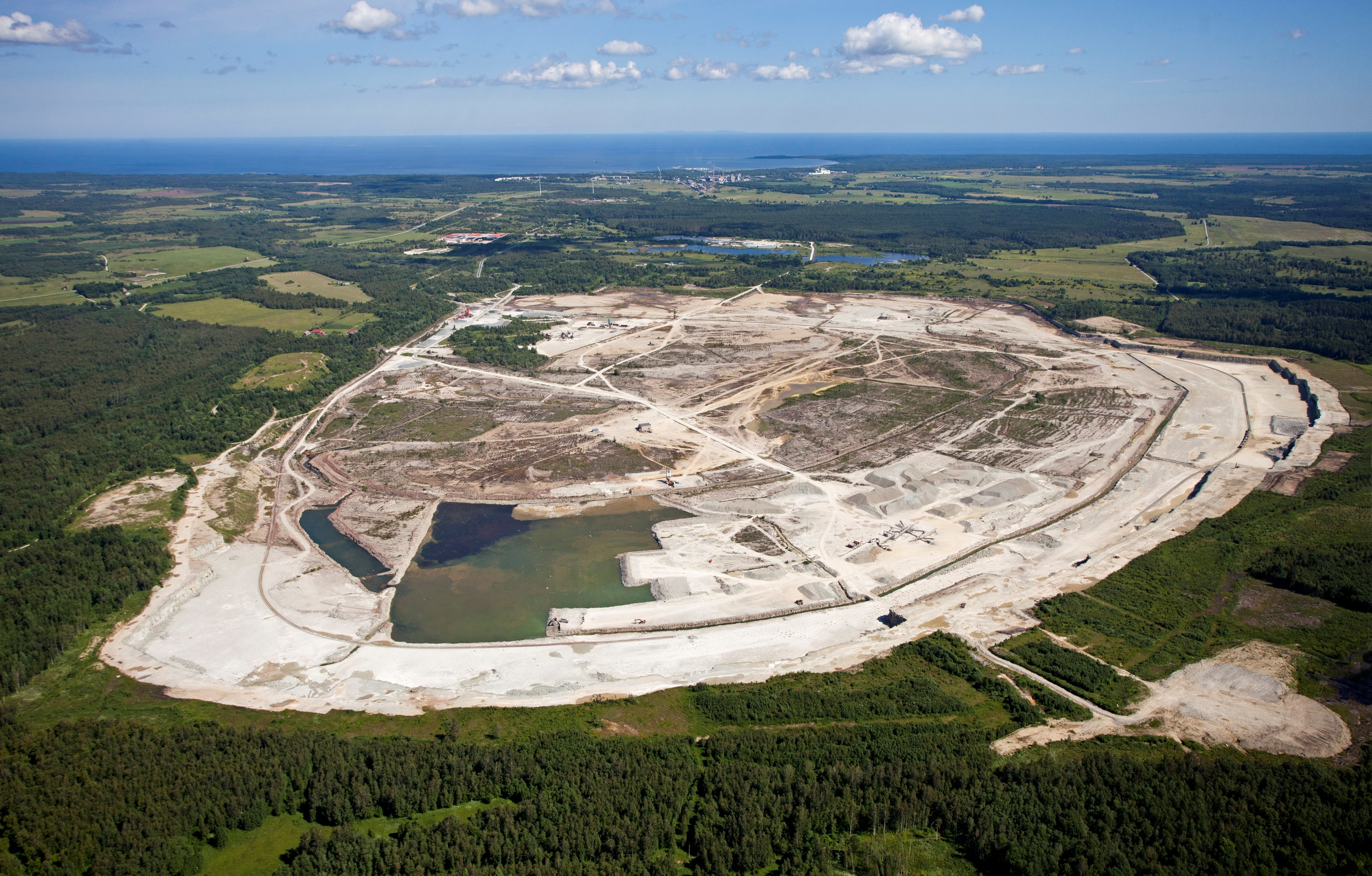 Aru-Lõuna lubjakivikarjäär